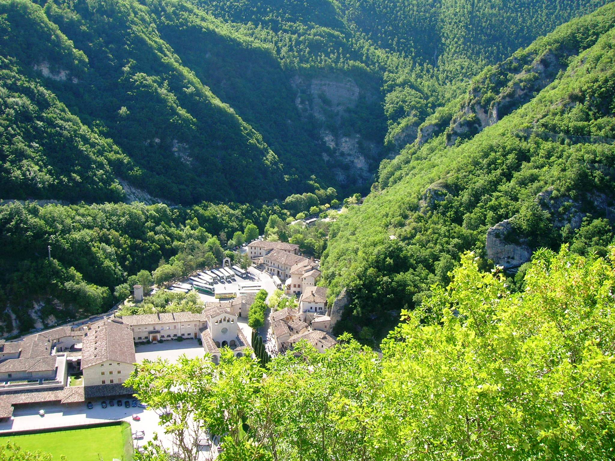 Veduta di Roccaporena